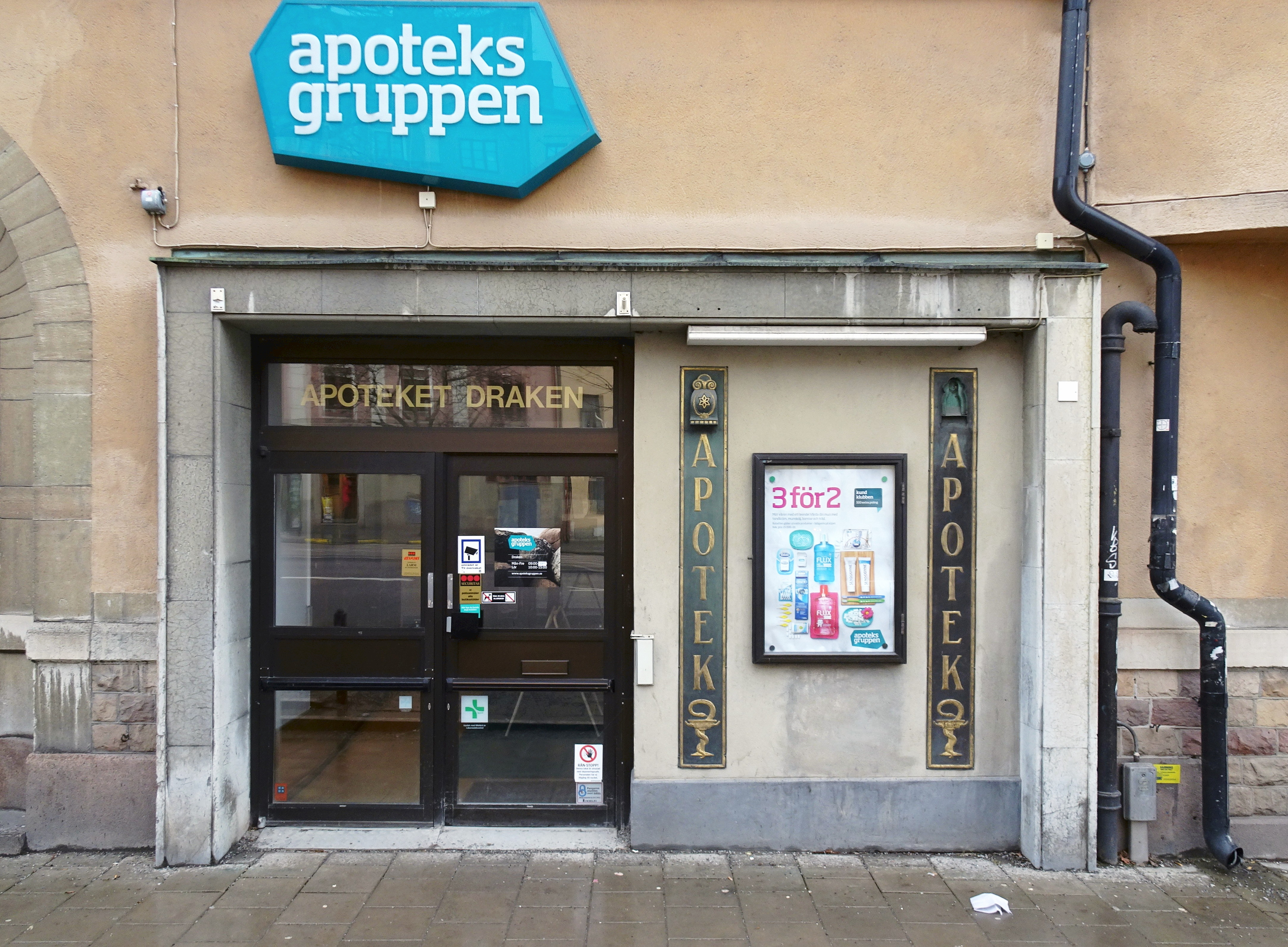 Apoteket Draken Karlbergsvägen 43B (adressen sedan 1981)